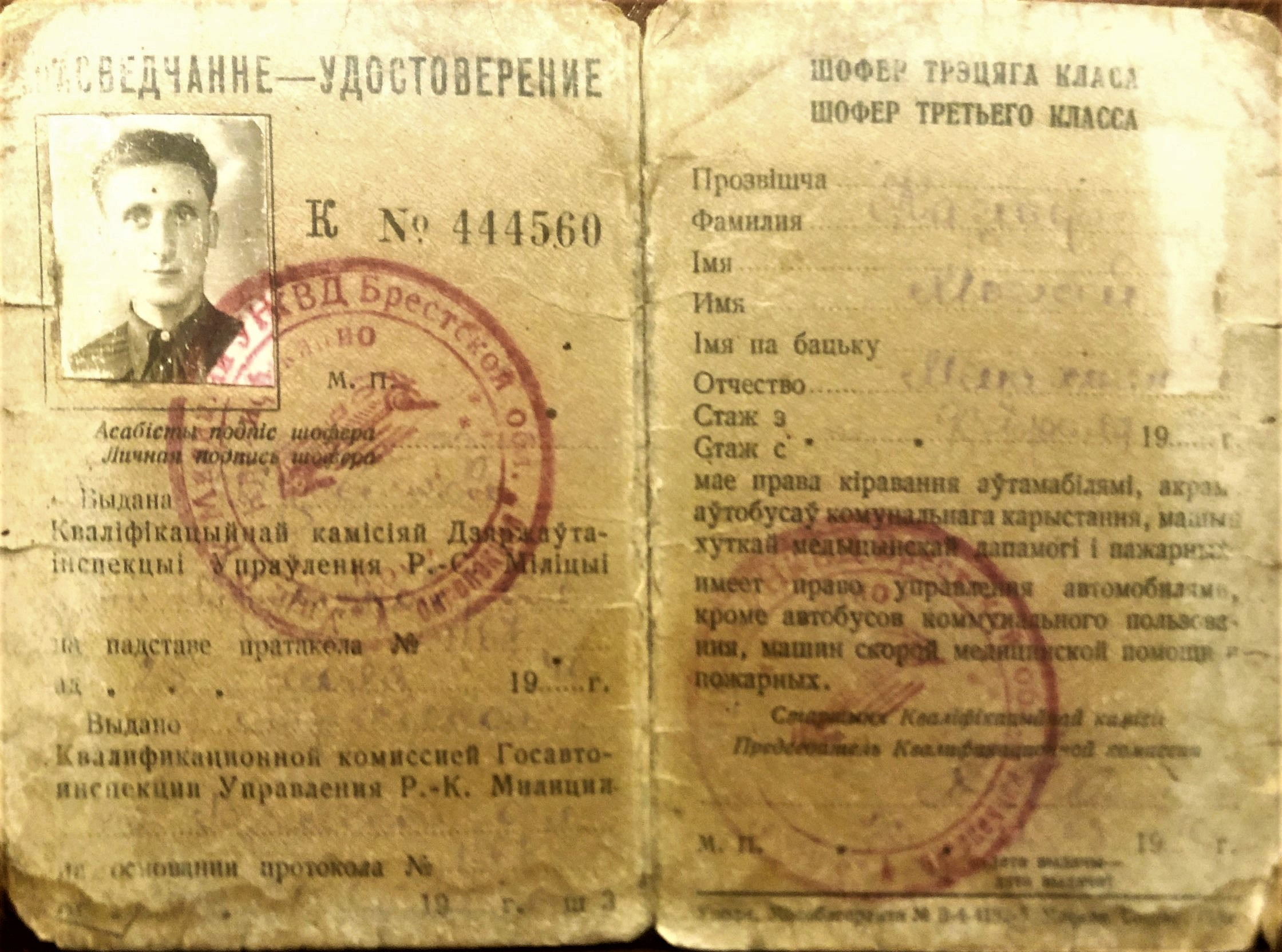 כריכת תעודה רשמית של משה קצף ז"ל, יליד קהילת בריסק דליטא, בתקופת מלחמת העולם השנייה.